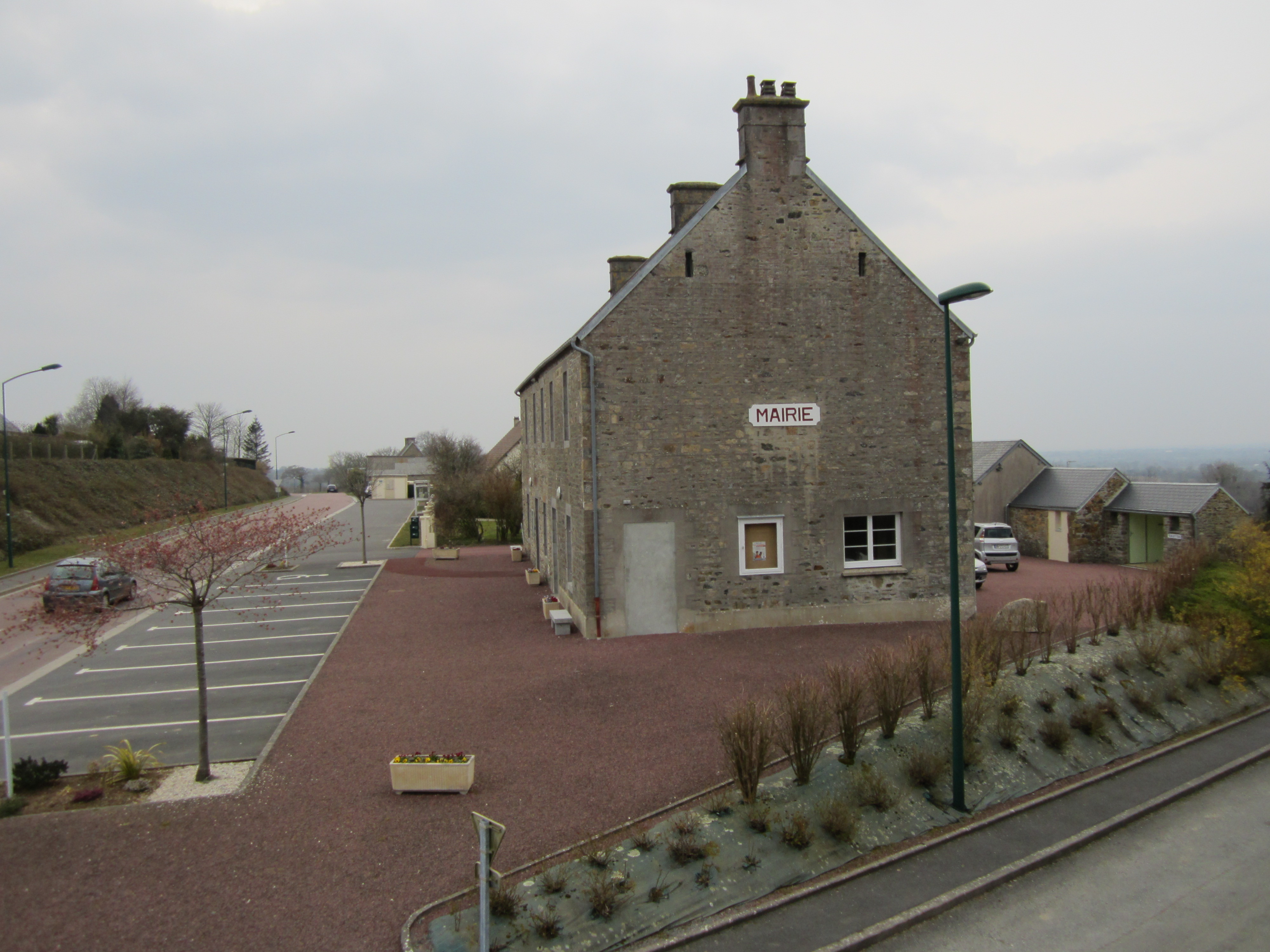 Église Saint-Martin de Monthuchon